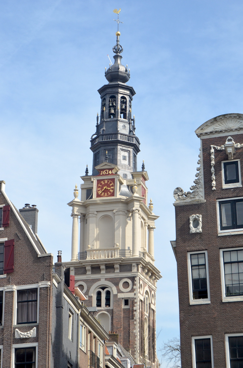 Zuiderkerkstoren gezien vanaf de Kloveniersburgwal. Sinds de laatste opknapbeurt in 2017 is het bovenste deel van de toren donkergrijs geschilderd. Foto: Erik Swierstra